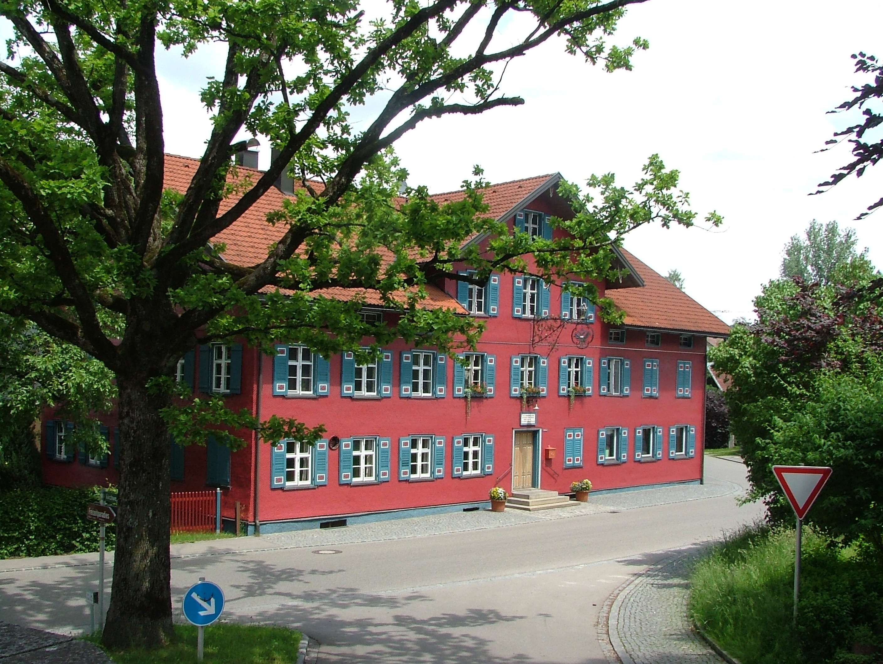 Grünenbach